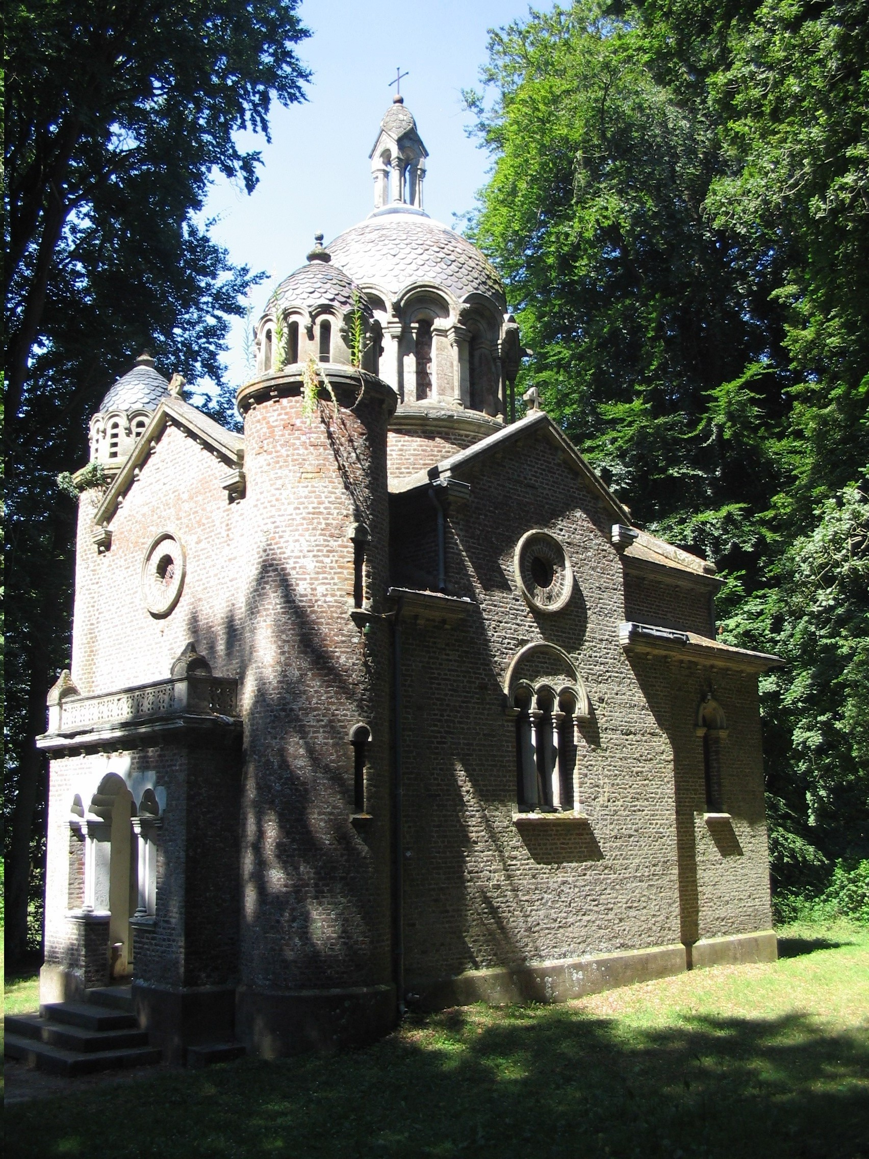 Chapelle néobyzantine à Wailly-Beaucamp construite en 1869 par Clovis Normand.